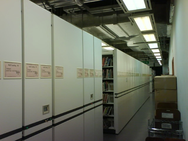 香港中央圖書館中央書庫